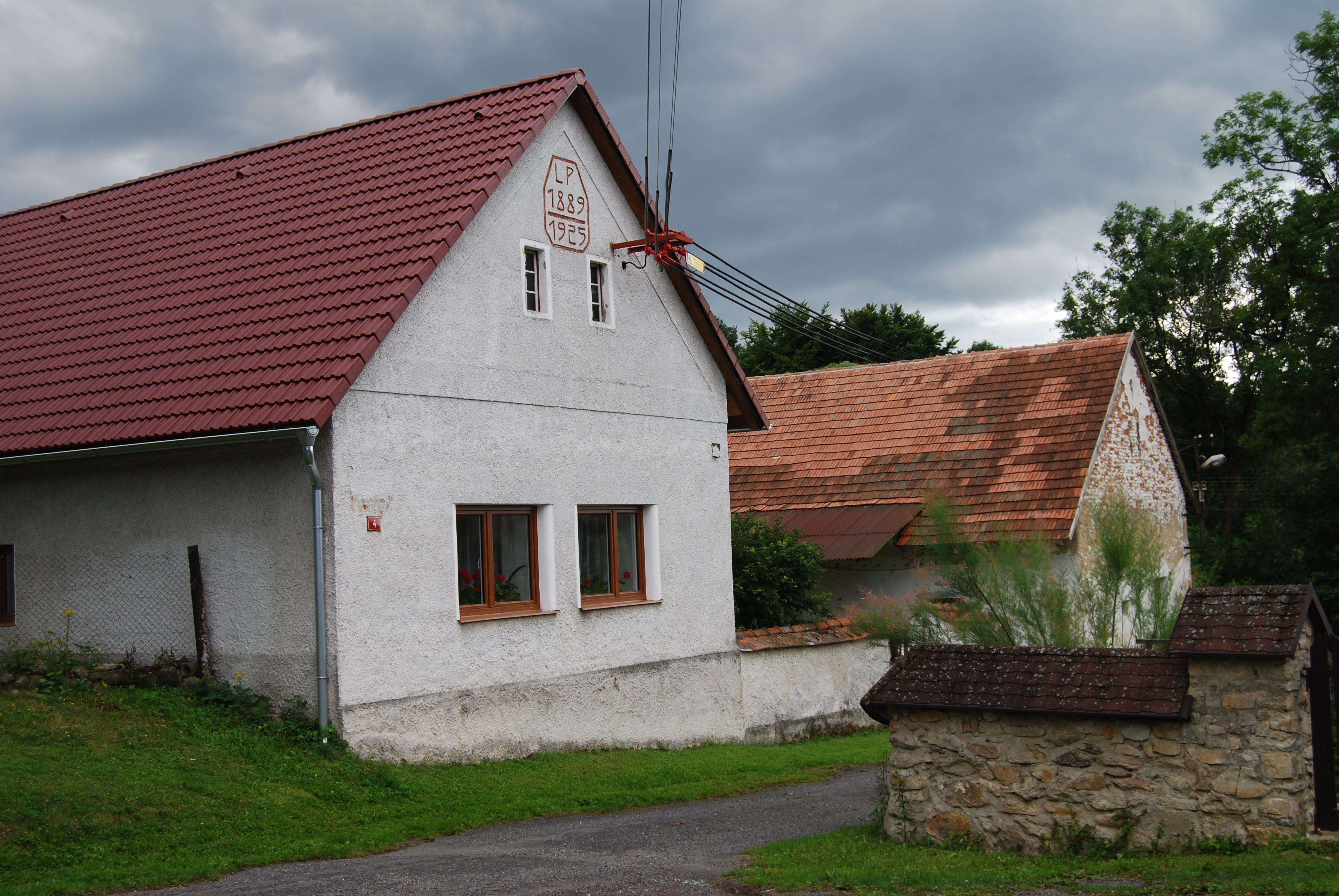 Pohled na usedlost v obci. Šichova Vesec je část obce Nadějkov v okrese Tábor. Česká republika.